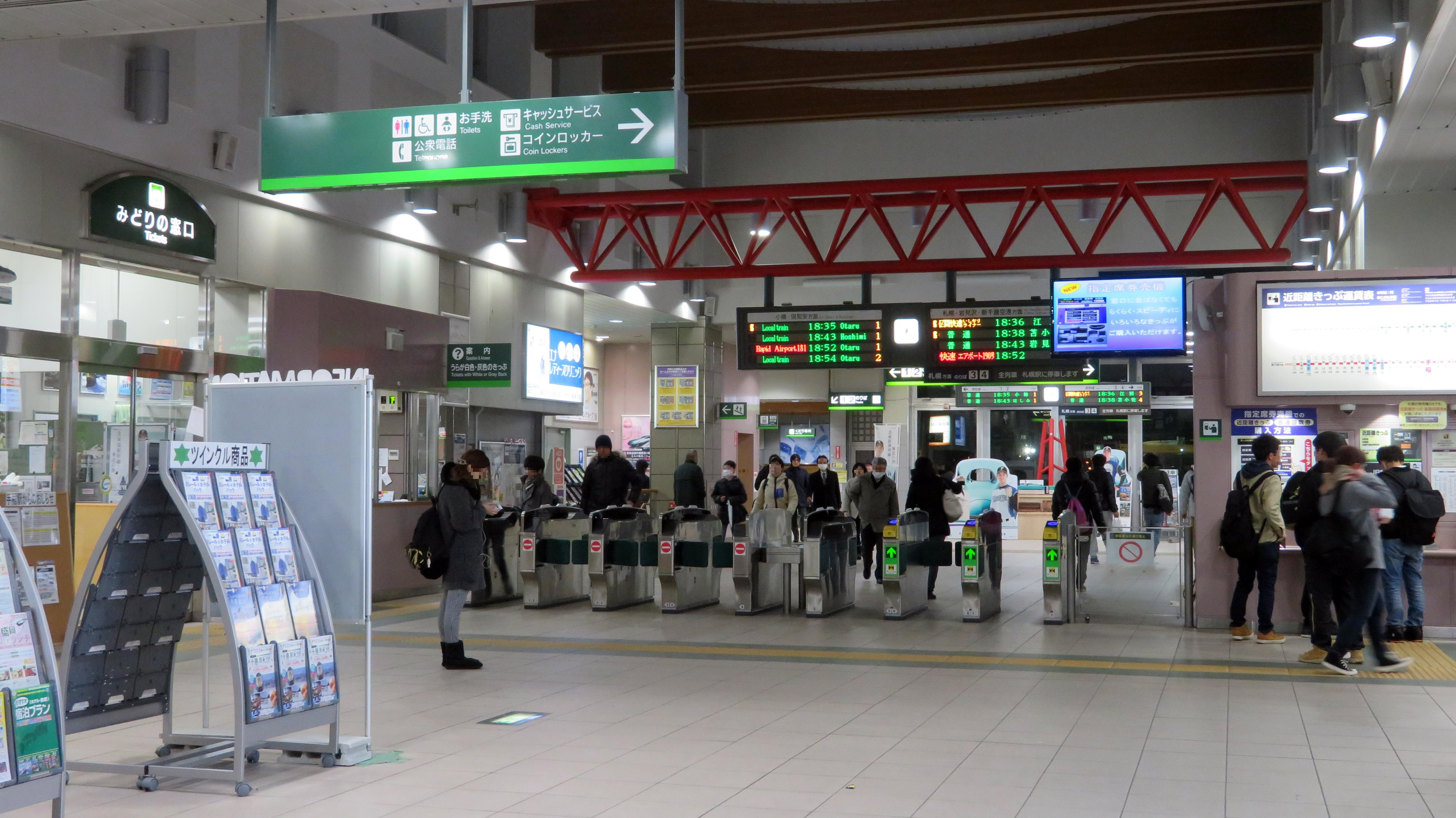 手稲駅改札口